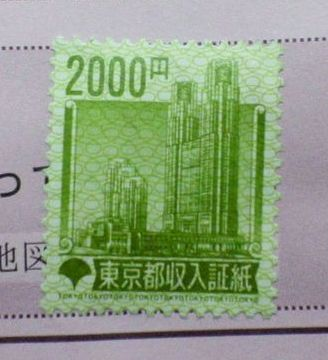 かつて使用されていた東京都の収入証紙。旅券発行申請時に使用したものを投稿者が撮影。